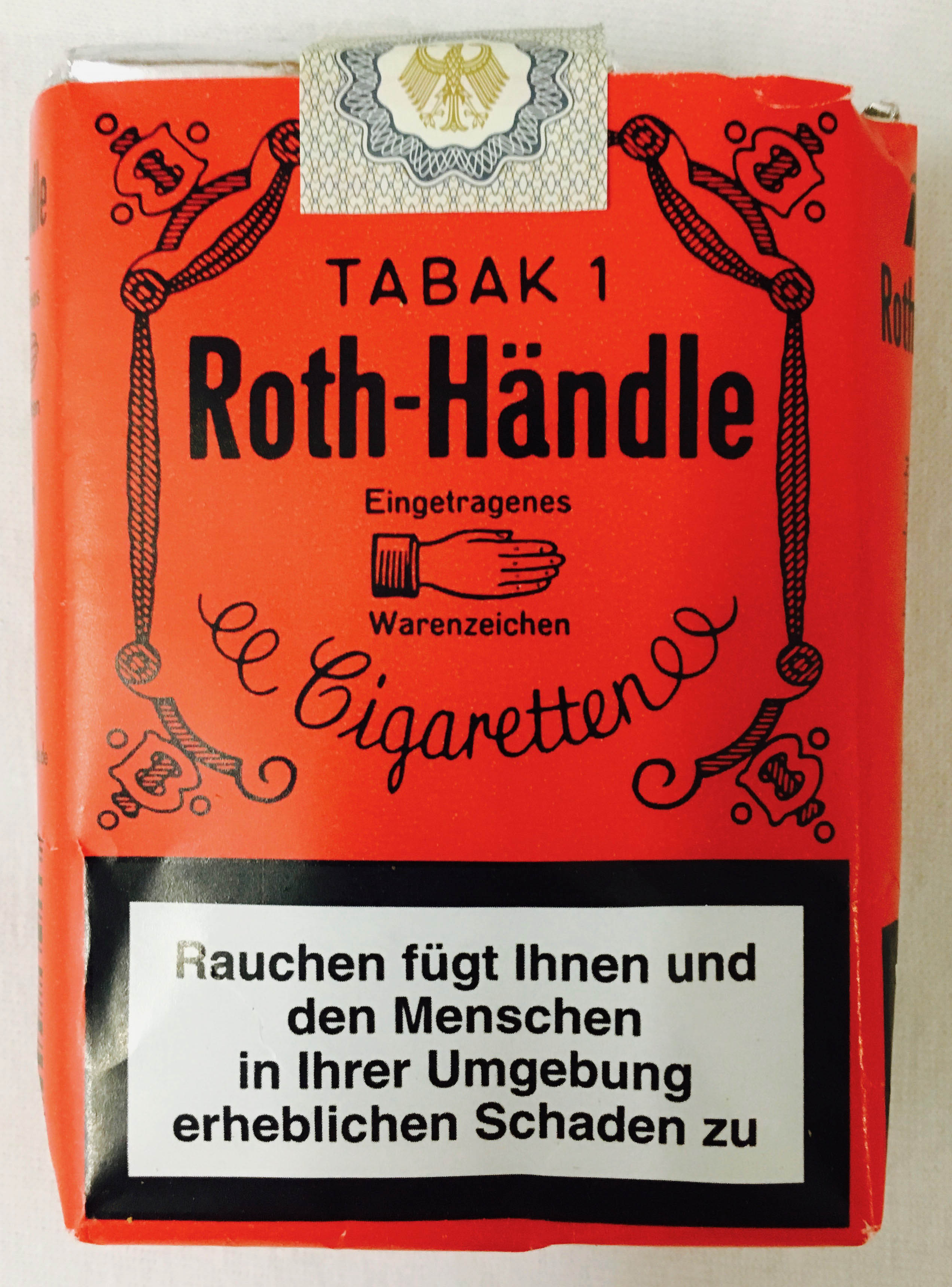 Zigaretten Softcase Roth-Händle